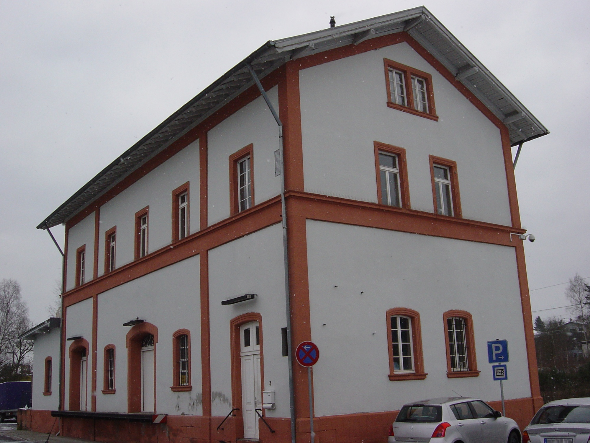 Güterstr. 3, 66450 Bexbach